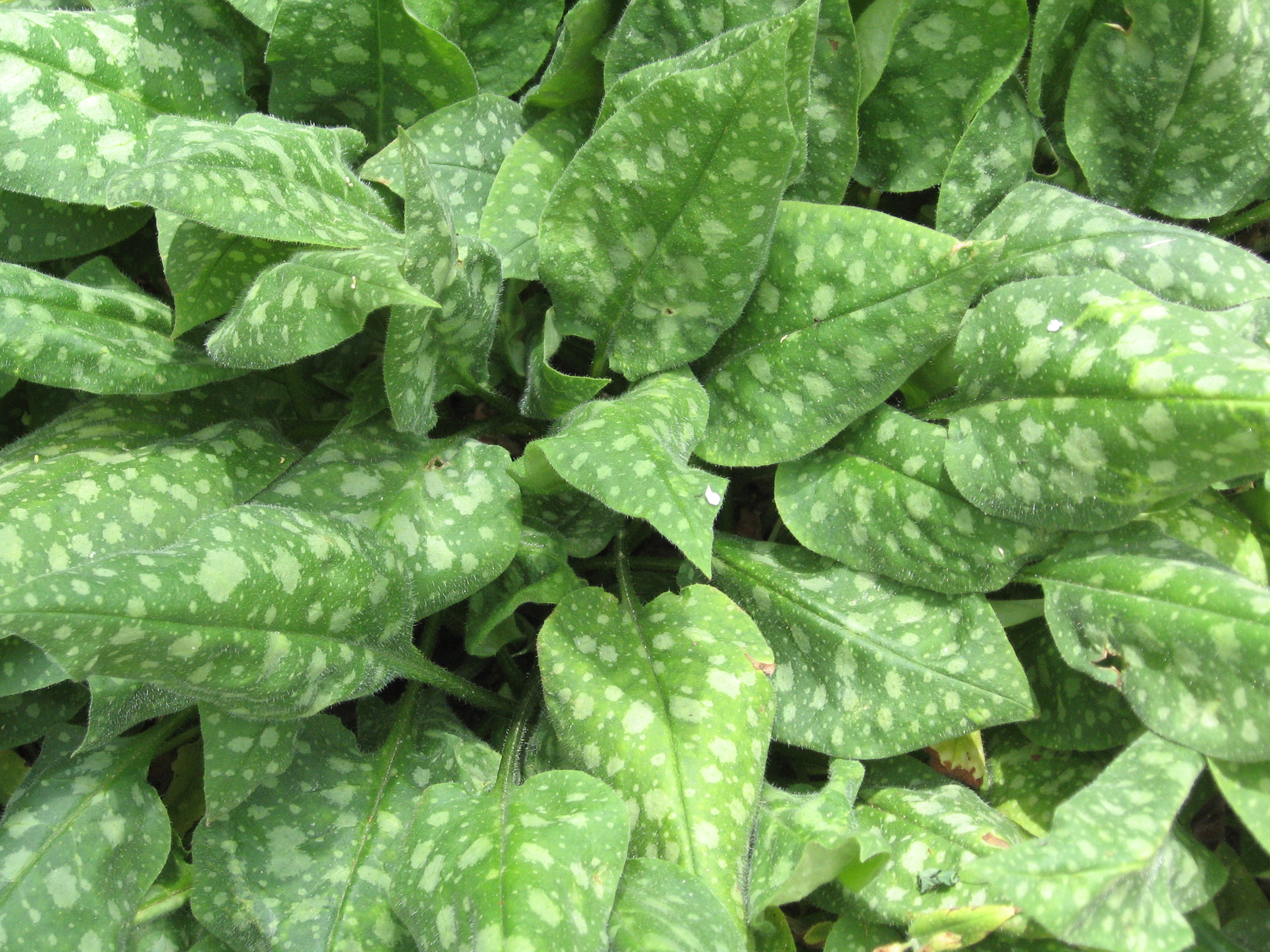 Pulmonaria saccharata 'Argentea'. Real Jardín Botánico de Madrid.